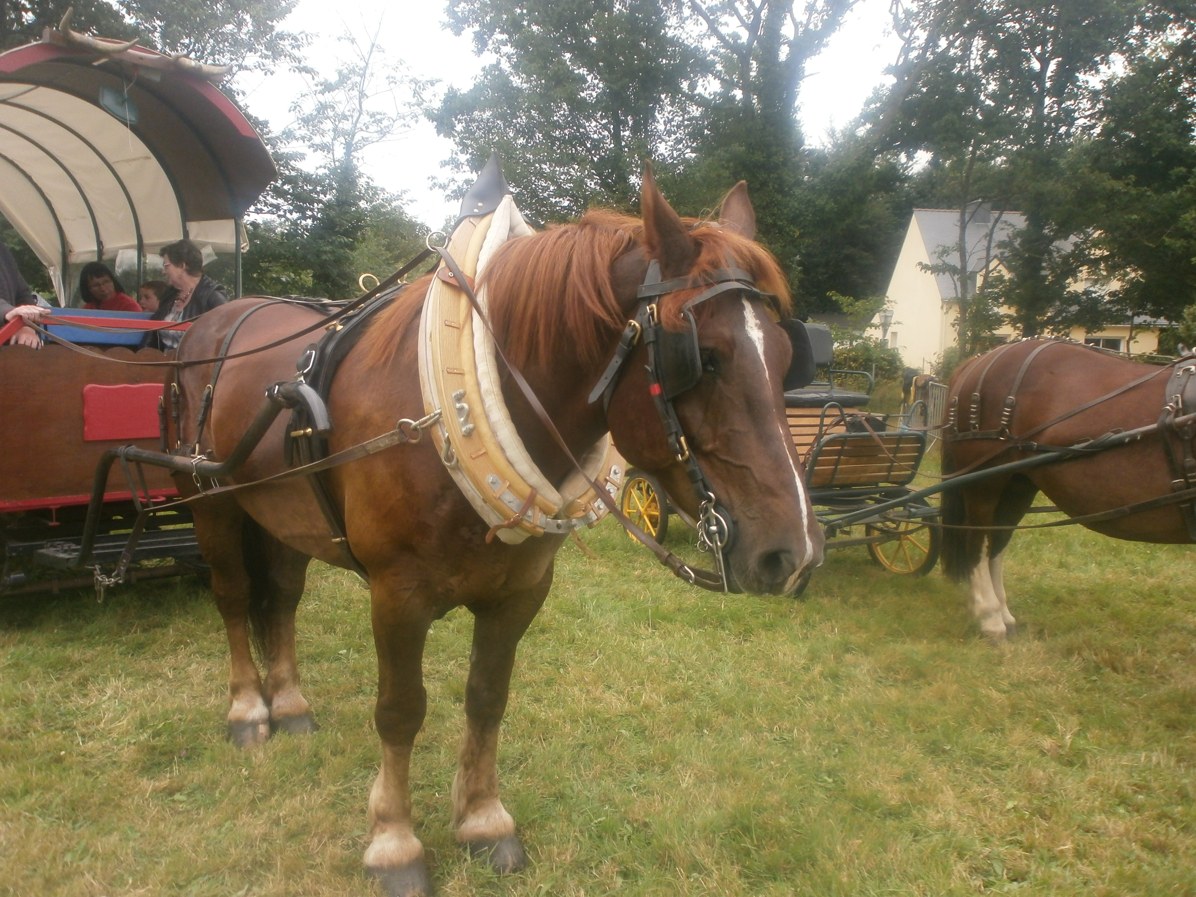 Cheval breton à la fête du cheval de Saint-Guyomard 2016